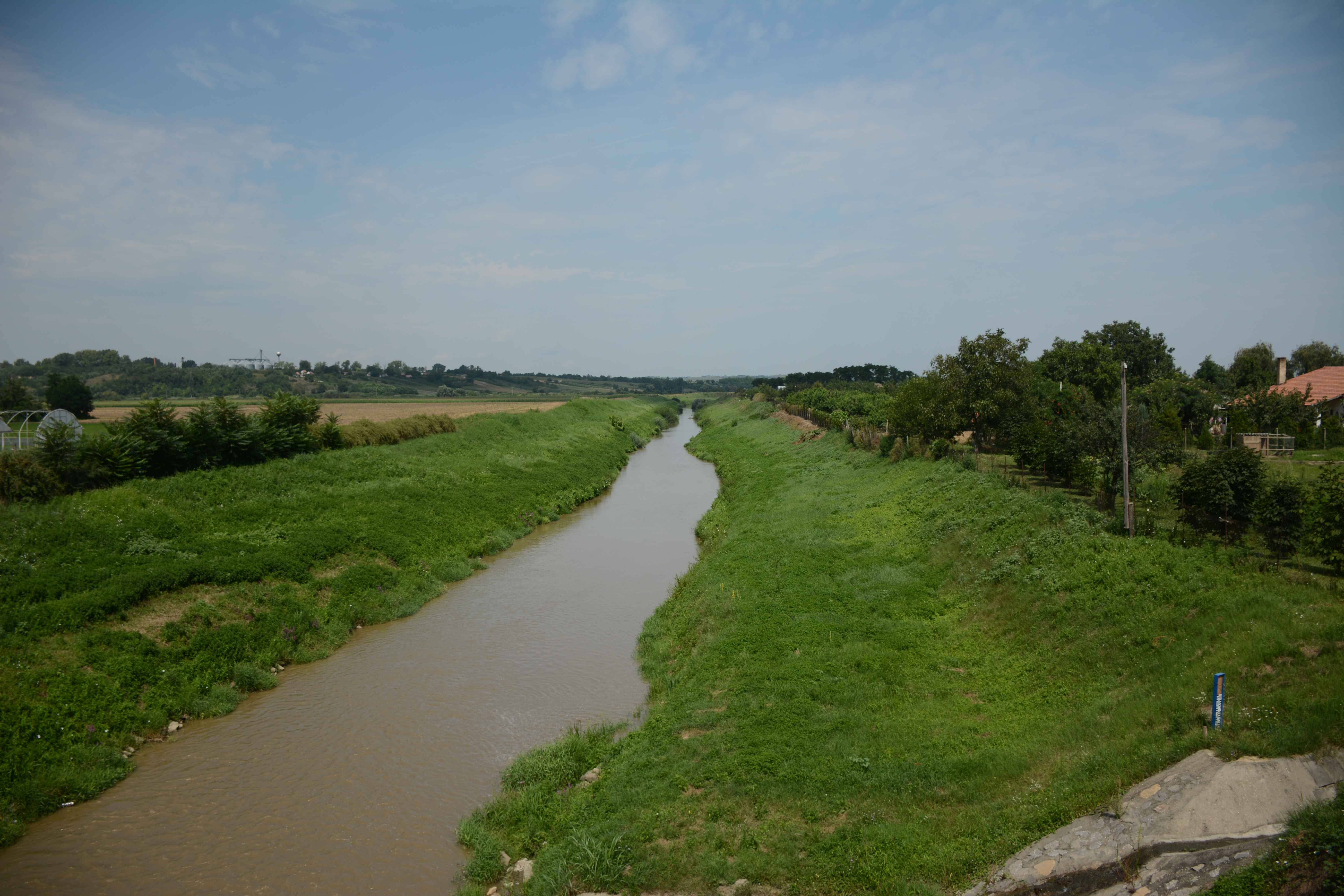 Kapos-patak